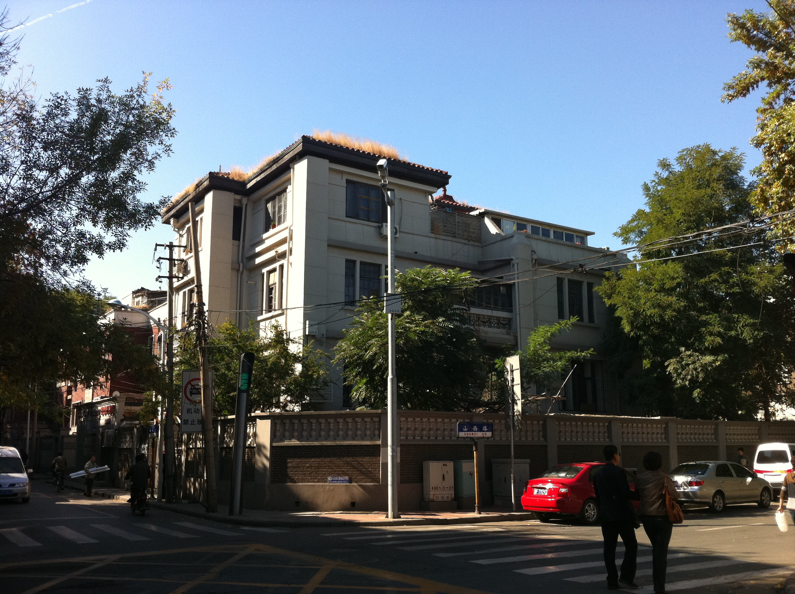 中文（中国大陆）: 曹汝霖旧居 (山西路)